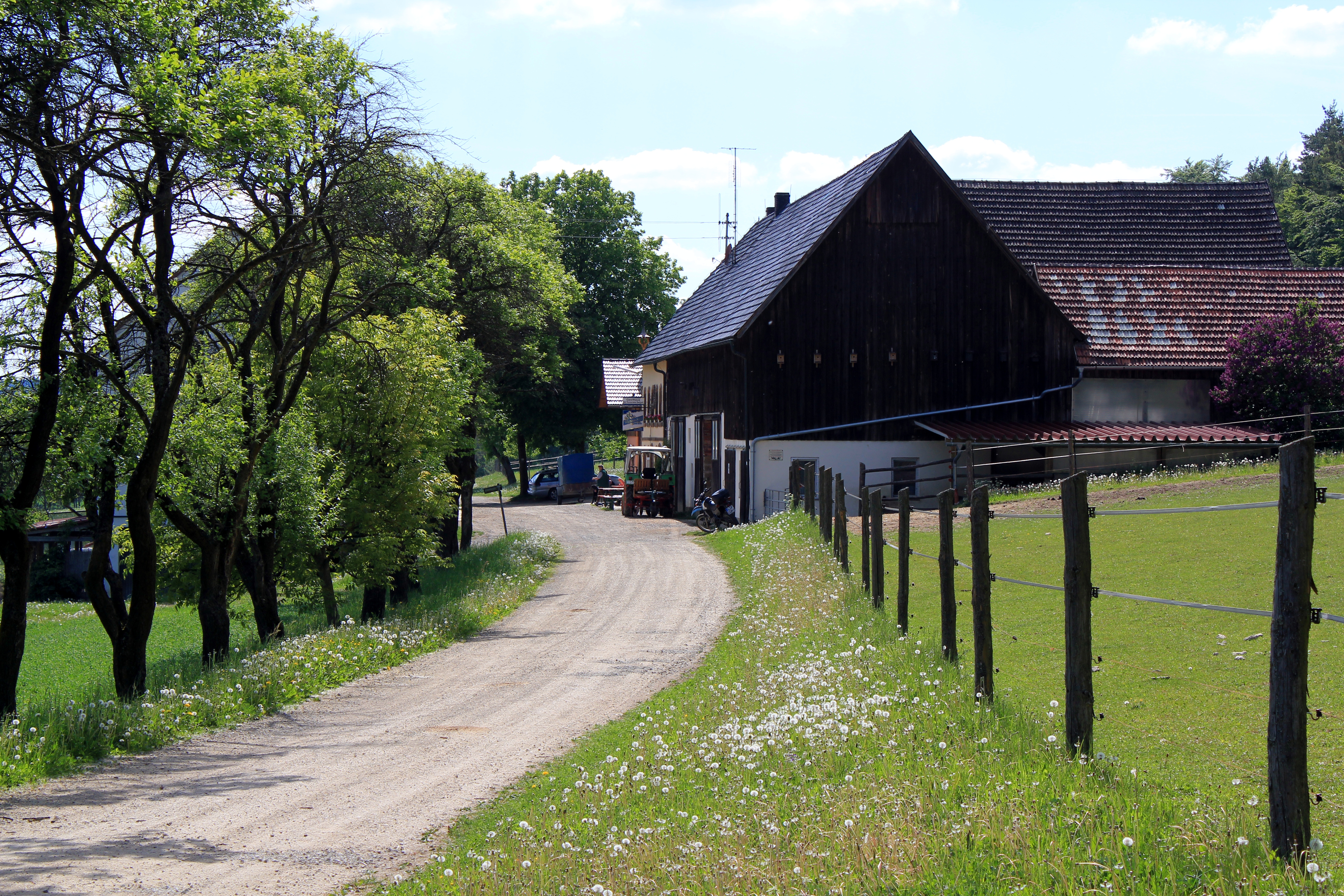 Der 1870 errichtete Hof auf dem Kordigast. Es gibt dort eine Wirtschaft, die nach einer Felsformation am kleinen Kordigast benannt ist, die "Steinerne Hochzeit".